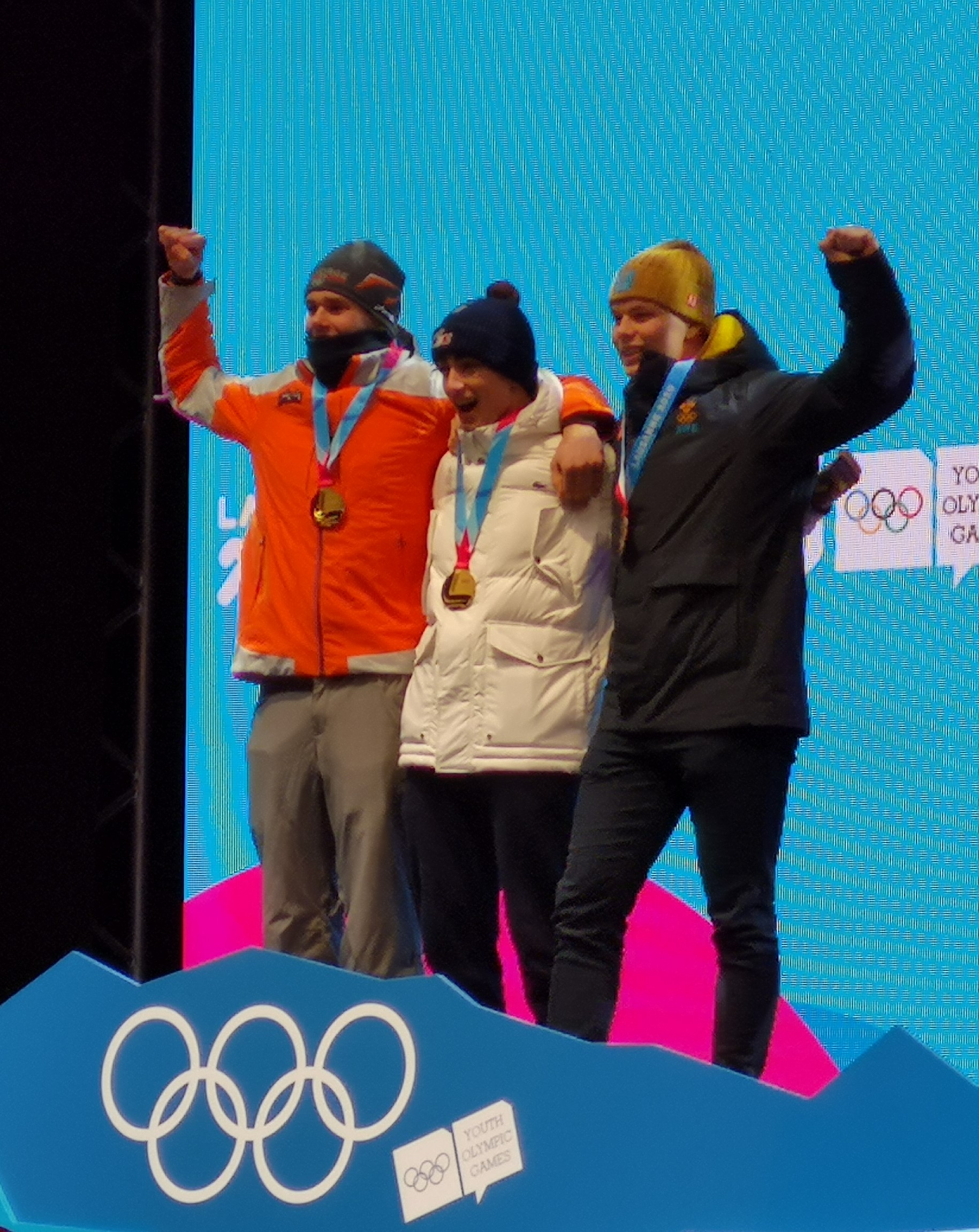 Le podium du combiné alpin masculin des JOJ de Lausanne 2020 : Auguste Aulnette (FRA) et Mikkel Remsøy (NOR), premiers, et Adam Hofstedt (SWE).